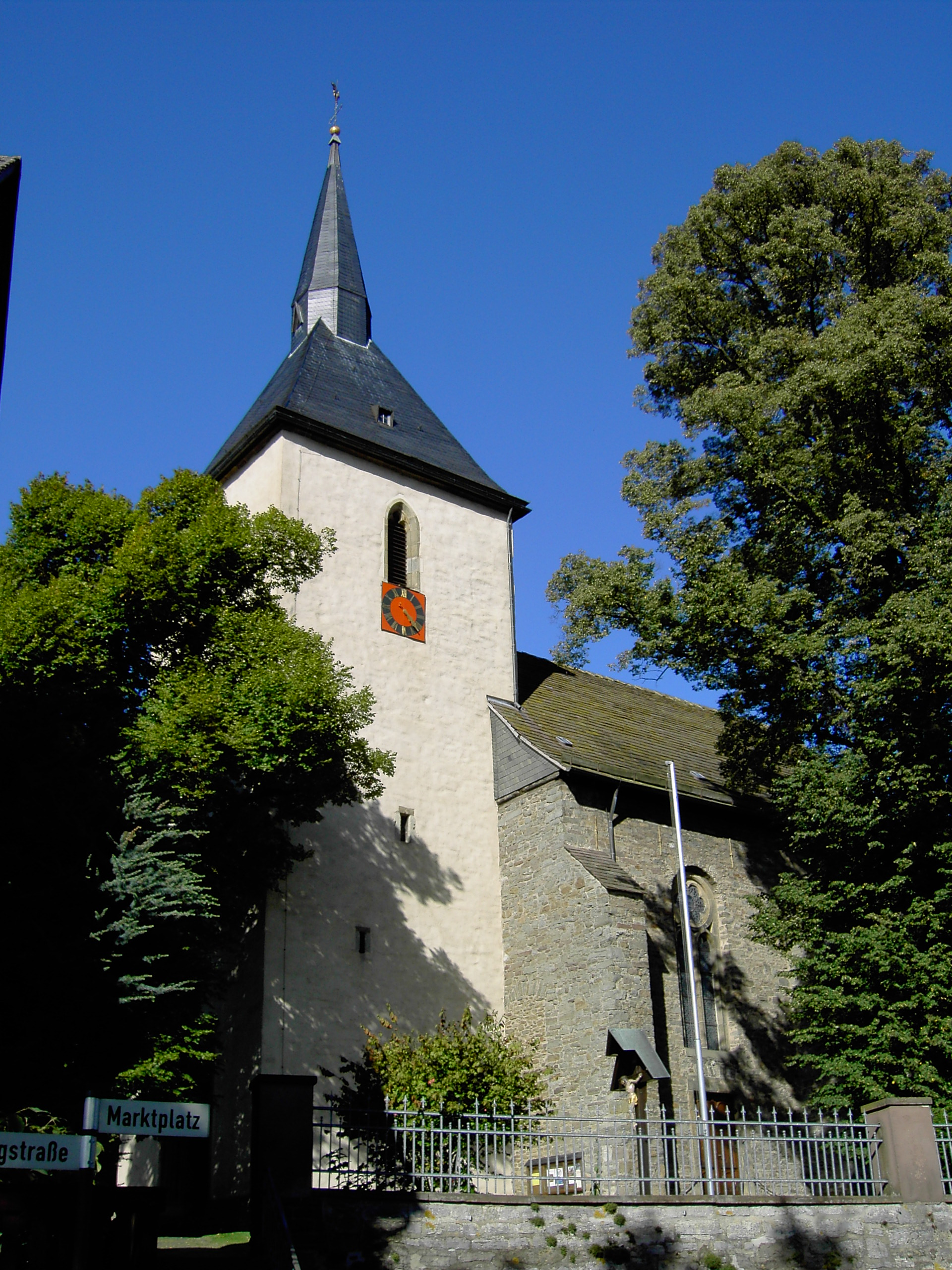 Kirche, Borgholz im September 2006.